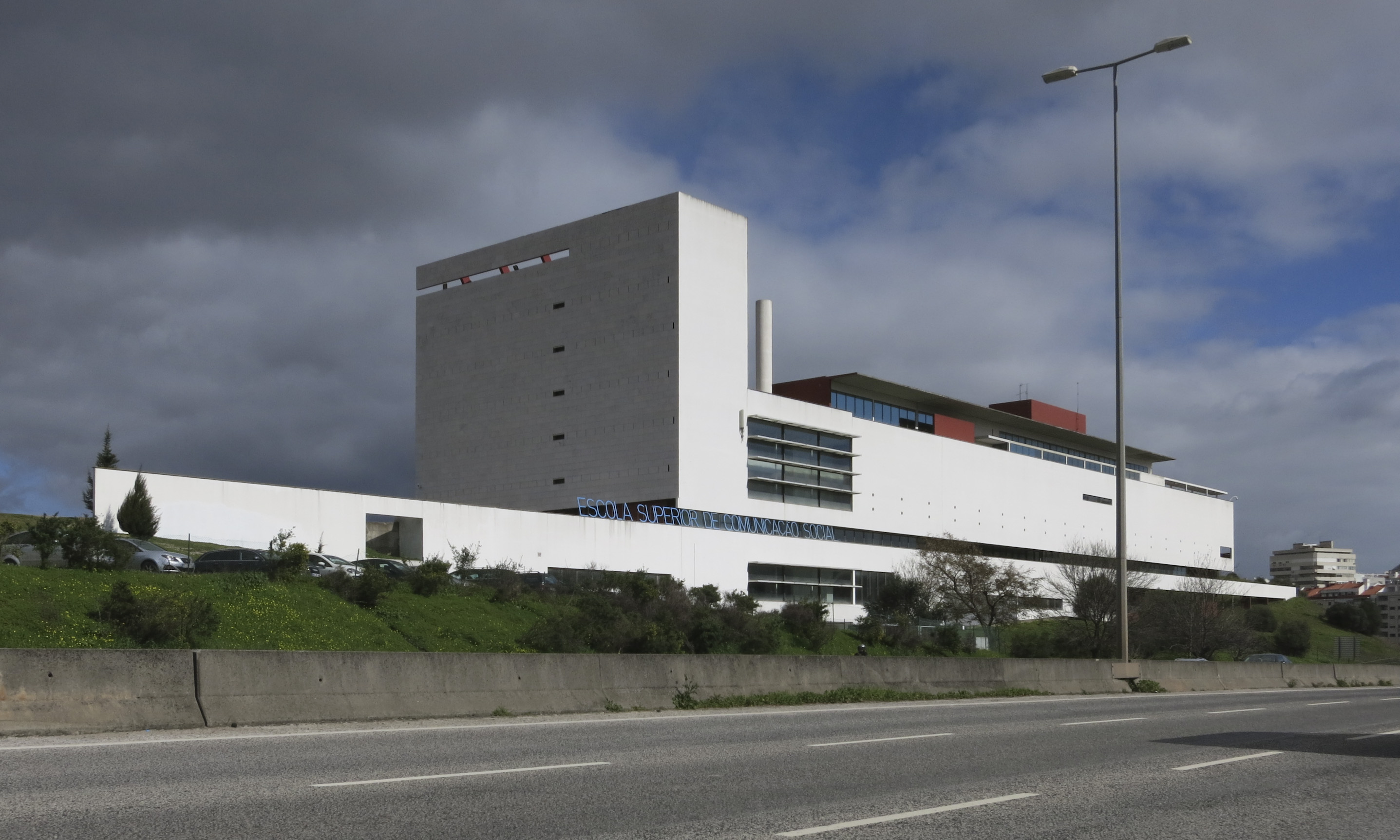 Escola Superior de Comunicação Social, Lisboa; Arq. João Luís Carrilho da Graça